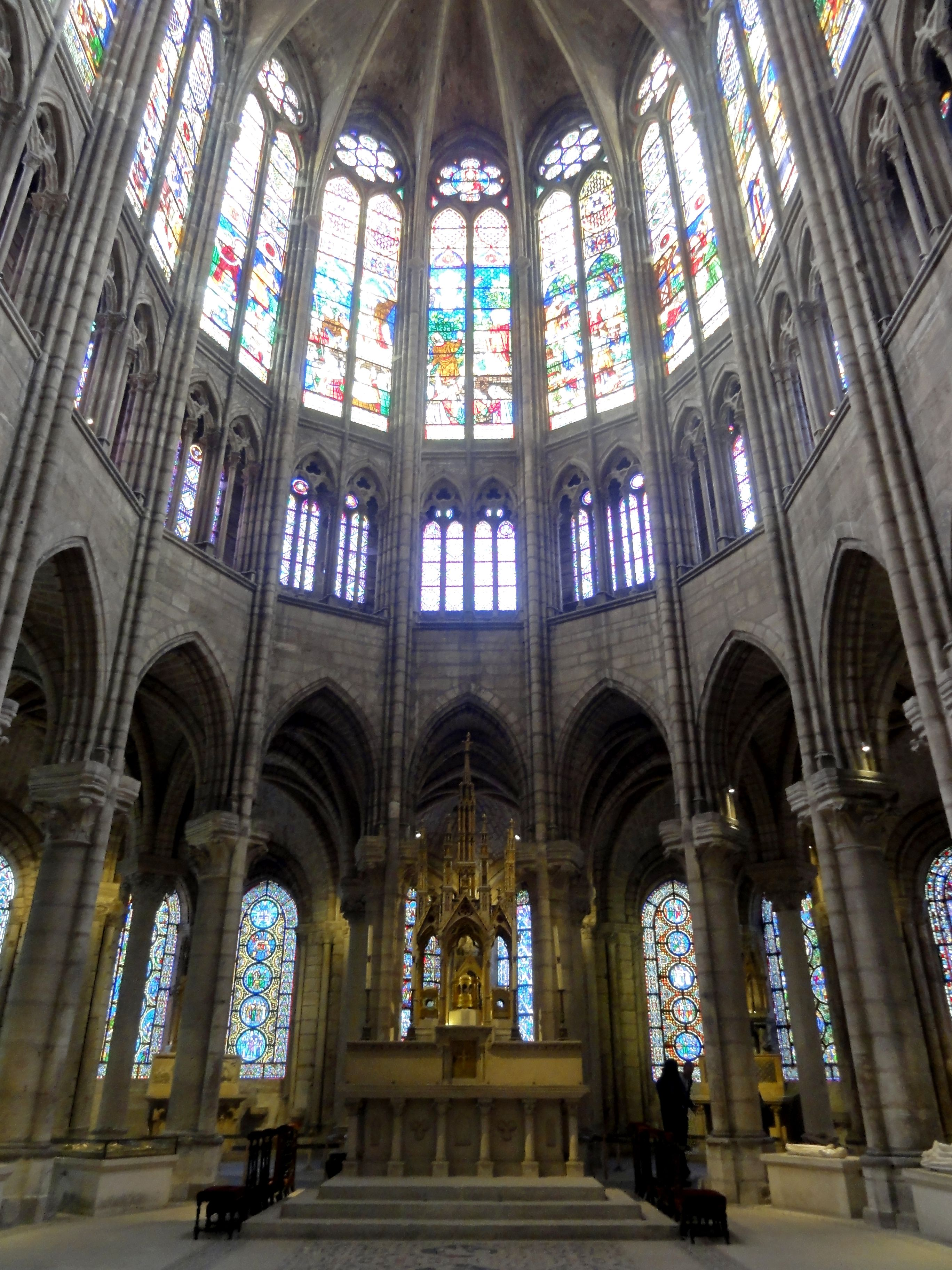 Abside.